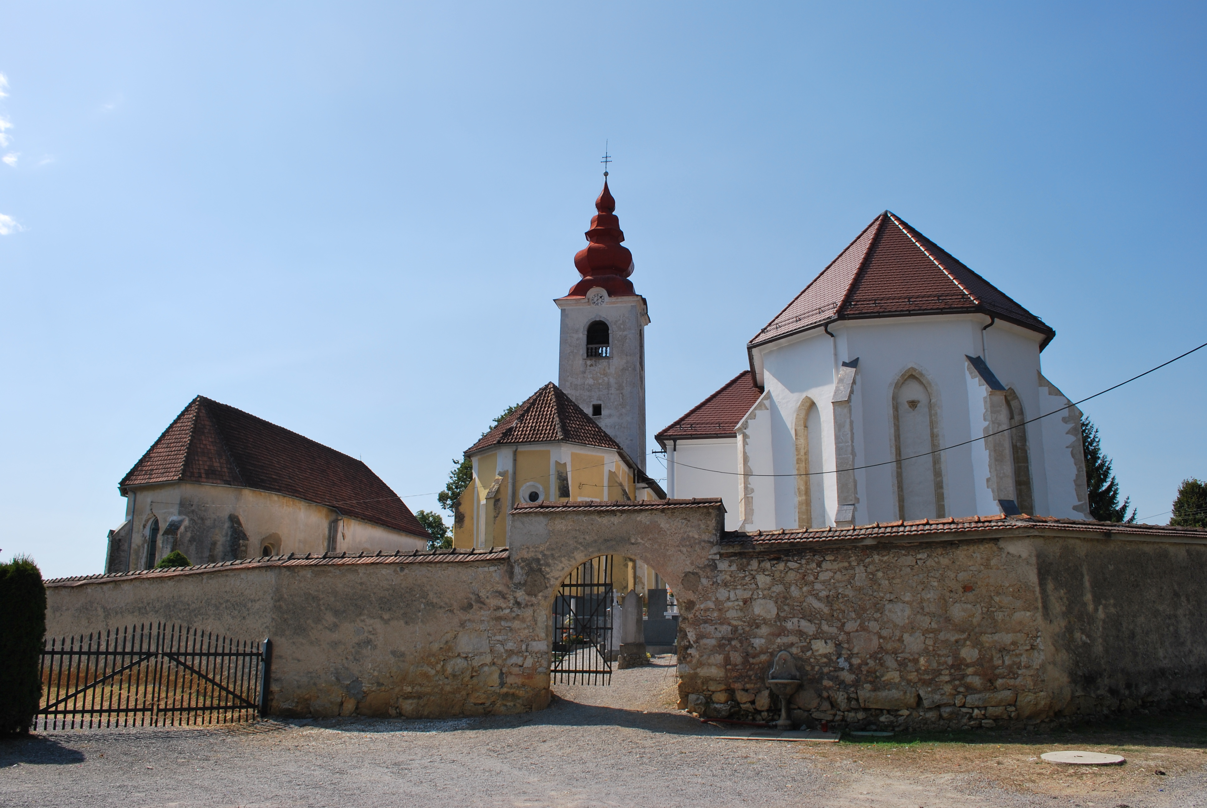 Ansicht der "Tri Fare", der 3 Kirchen in Rosalnice, Gemeinde Metlika, Landkreis Novo Mesto, Slowenien.